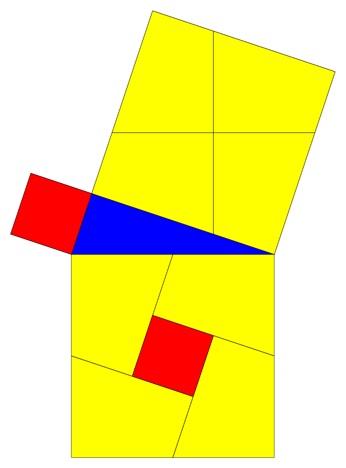 Dimostrazione del teorema di Pitagora trovata dall' matematico e astronomo persiano Abu'l-Wafa nel X secolo a.C. [1] [2] i riscoperta dall' agente di cambio Henry Perigal (en) nel 1872 (trovata nel 1835-1840 [3], pubblicato nel 1872 i anche dopo nel 1891 [4]). BW Insultami 17:21, Lug 11, 2005 (CEST)